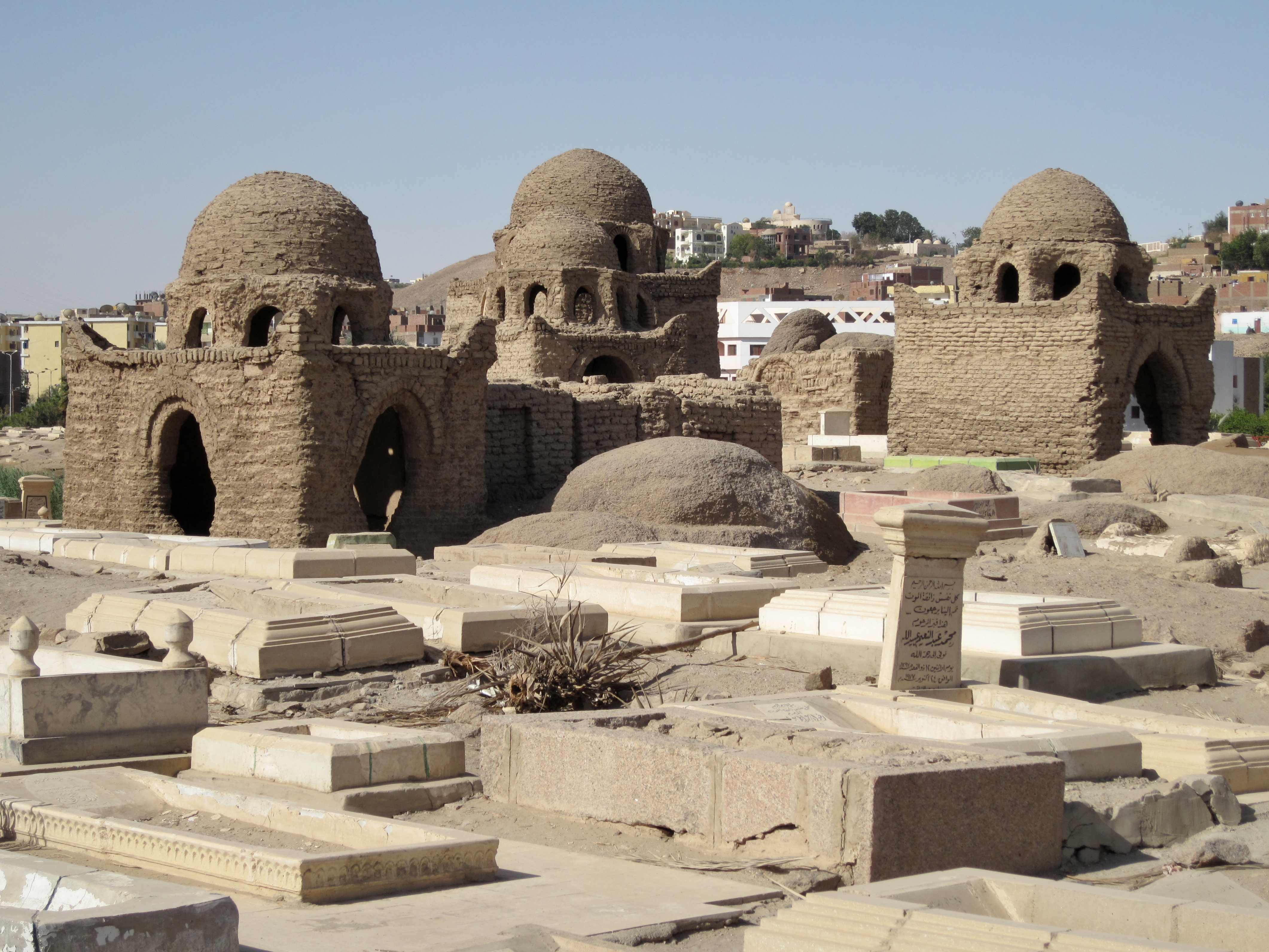 Islamischer Friedhof aus der Zeit der fatimidischen Sultane (969 bis 1171 n. Chr.) in Assuan, Ägypten